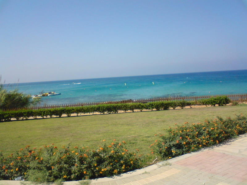 Protaras picture 2008